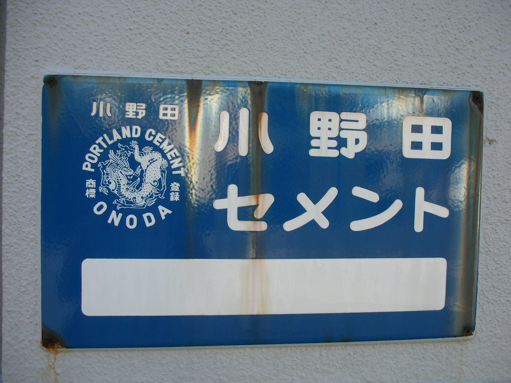 旧ホーロー看板